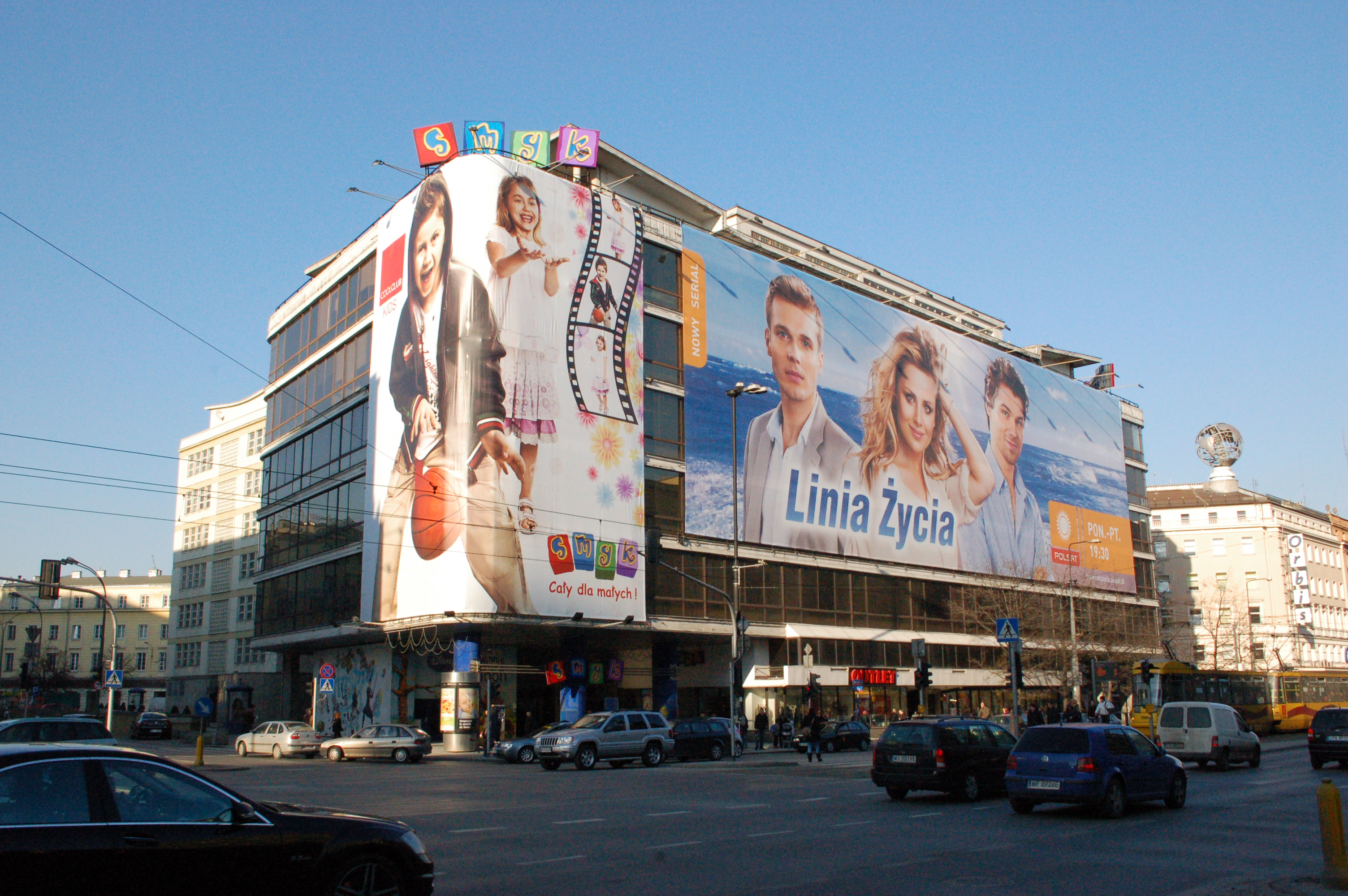 Jerozolimskie-Allee, Warschau